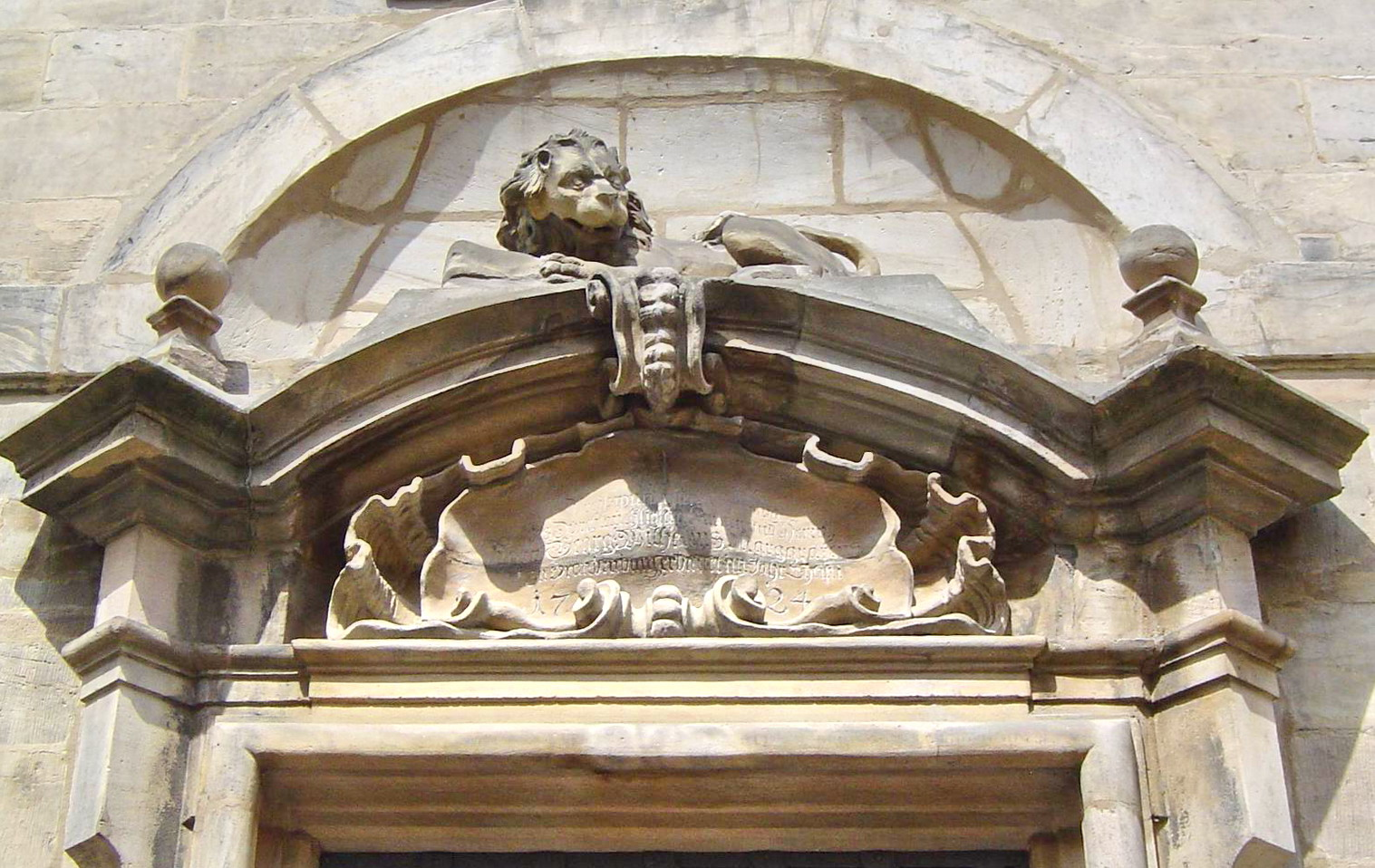 Bayreuth, Altes Rathaus, Brautgasse, Seitenportal mit Steinrelief, Denkmal Nr. D-4-62-000-229